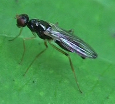 Strongylophthalmyia ustulata